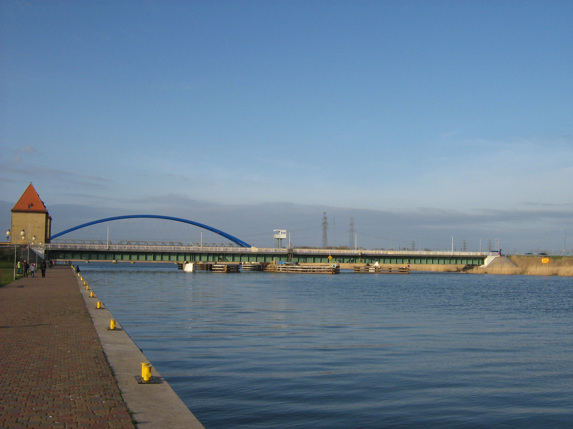 Most obrotowy w Wolinie